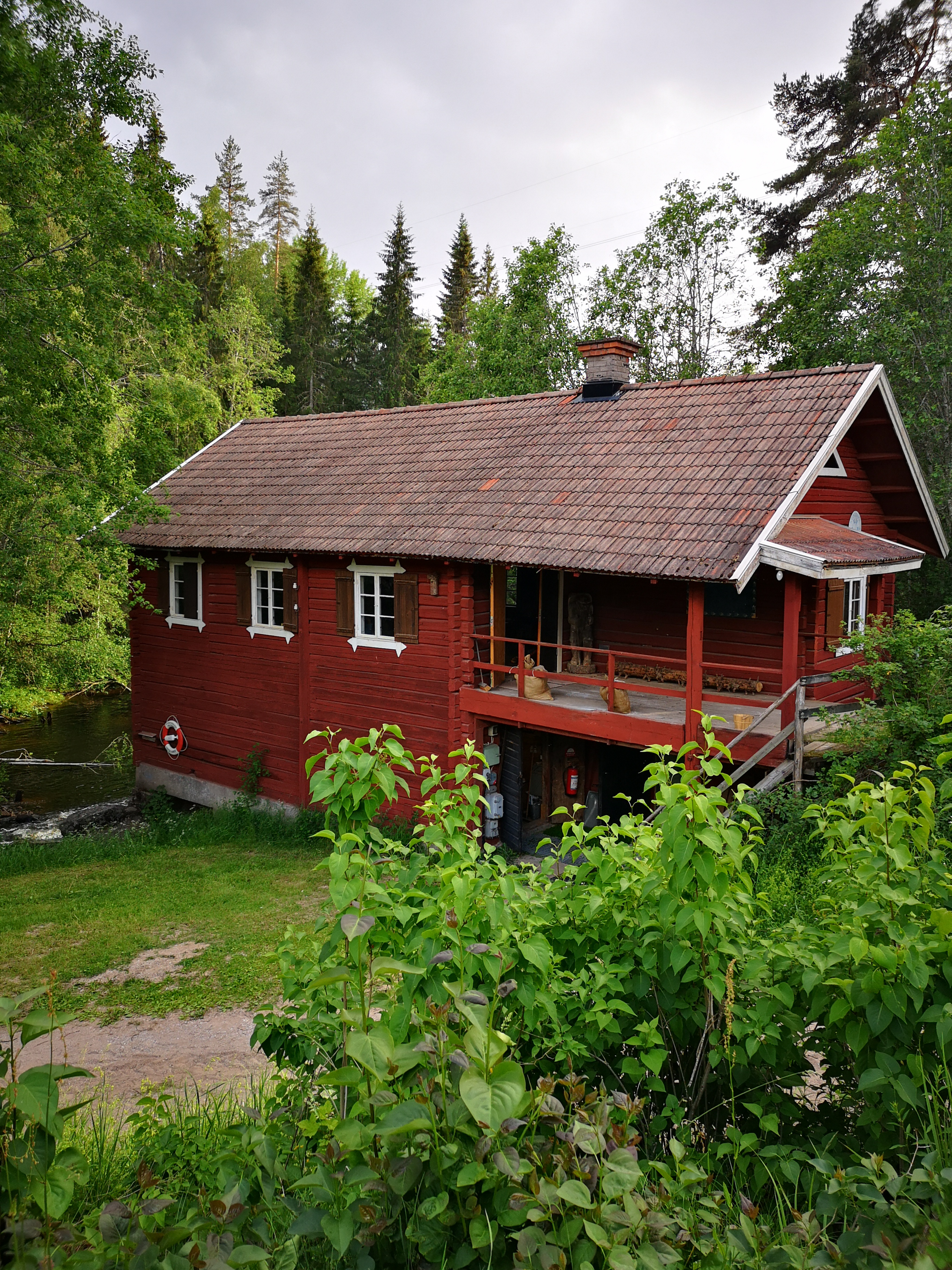 Bild på Kungshols kvarn